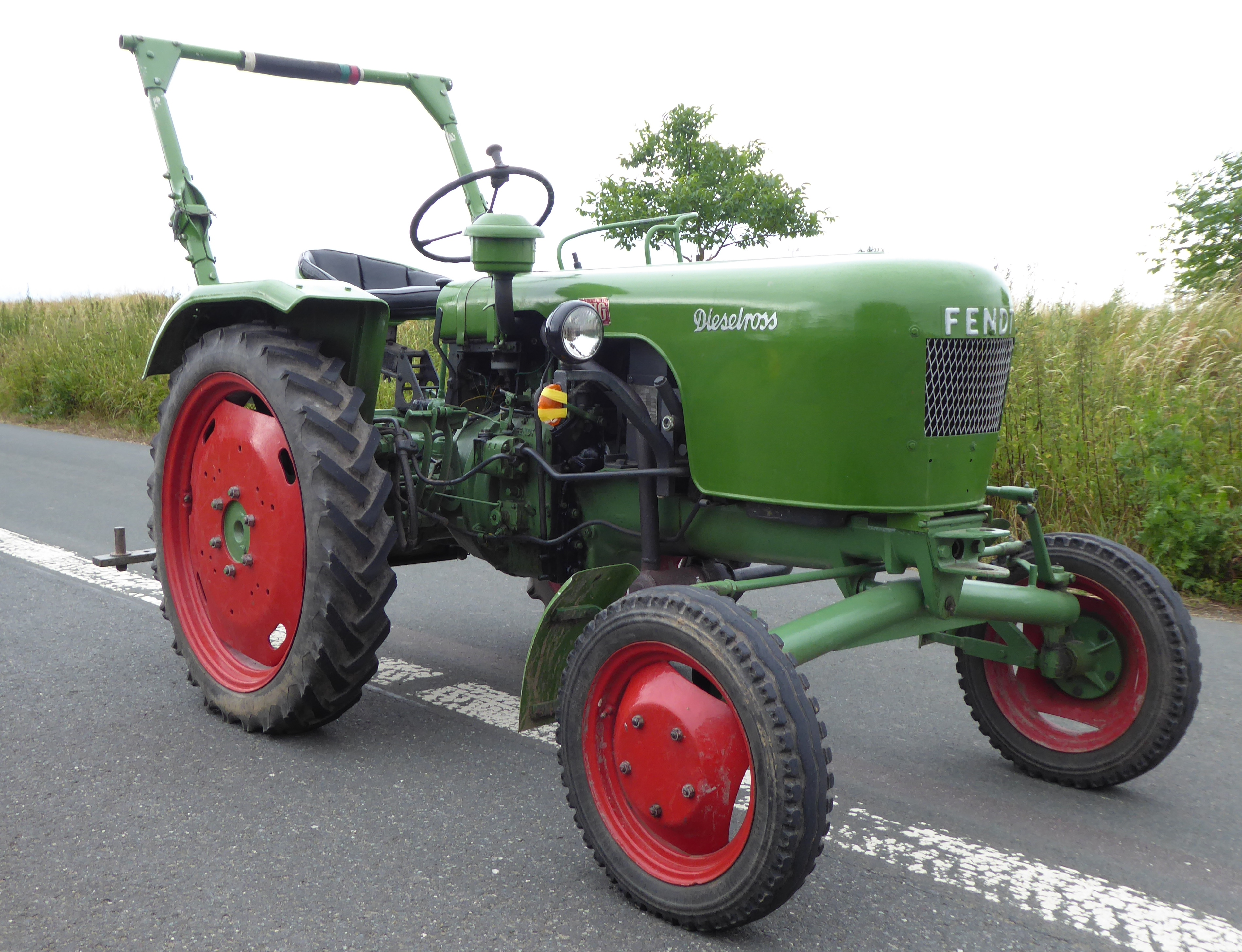 Fendt Traktor